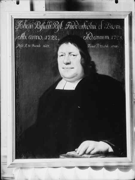 Porträtt föreställande Johan Possieth, kyrkoherde vid Riddarholmsförsamlingen 1722-28. Kategori: (09) PorträttPorträtt föreställande Johan Possieth, kyrkoherde vid Riddarholmsförsamlingen 1722-28.